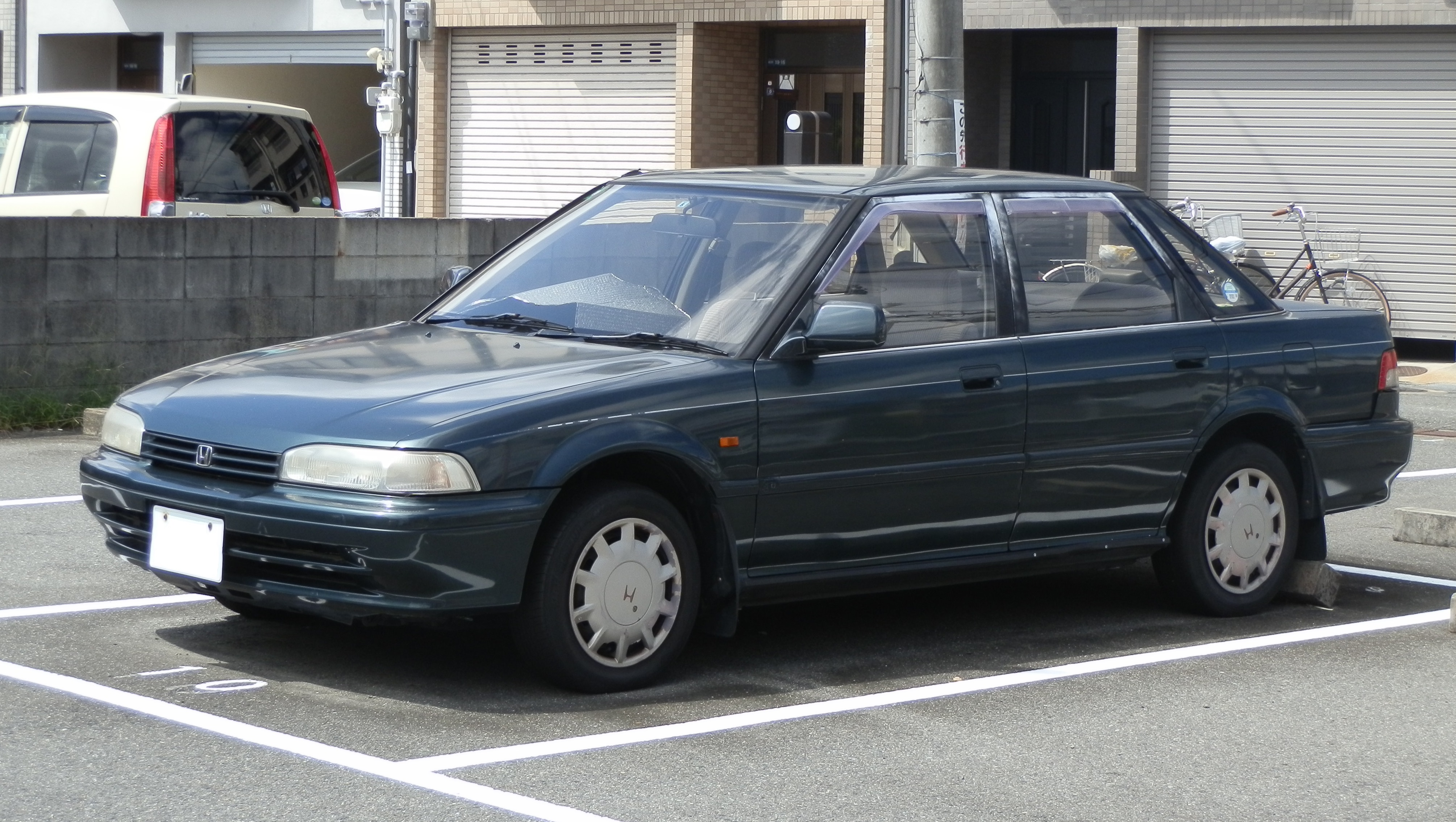 後期型4ドア フロント 日本仕様